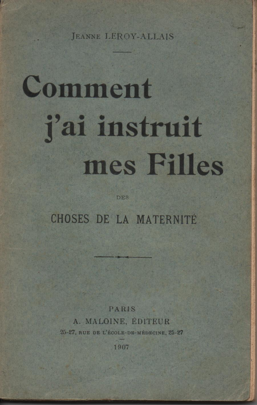 Livre "Comment j'ai instruis mes filles des choses de la maternité"Jeanne Leroy-Allais (1853-1914) Maloine Paris 1907, 128 pages. Jeanne Allais est la soeur de Alphonse Allais.